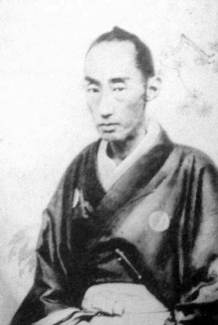 a Japanese man 松平容保 (Katamori Matsudaira)